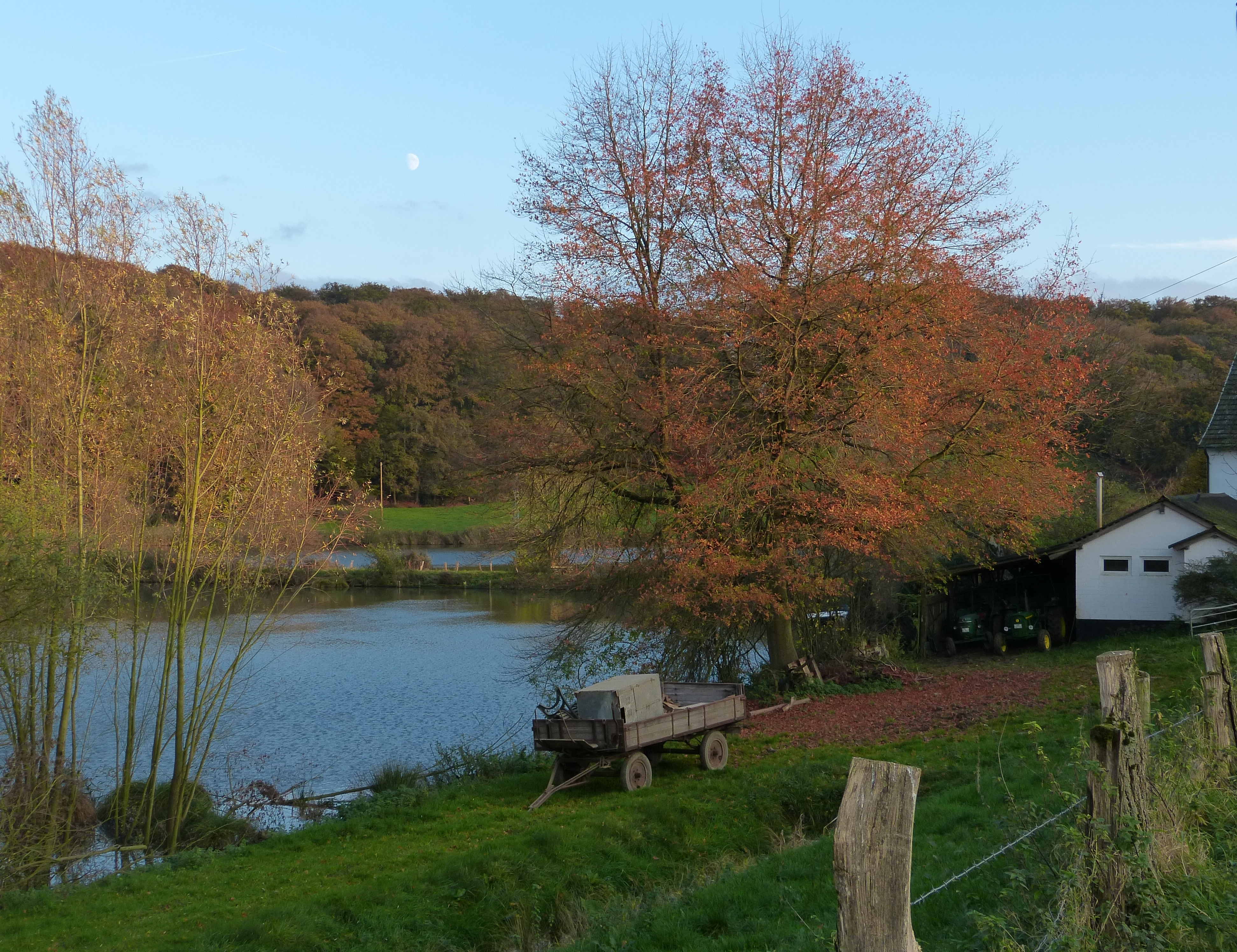 Erkrath, Morper Bachtal, Blick auf die Teiche und das Morper Bachtal